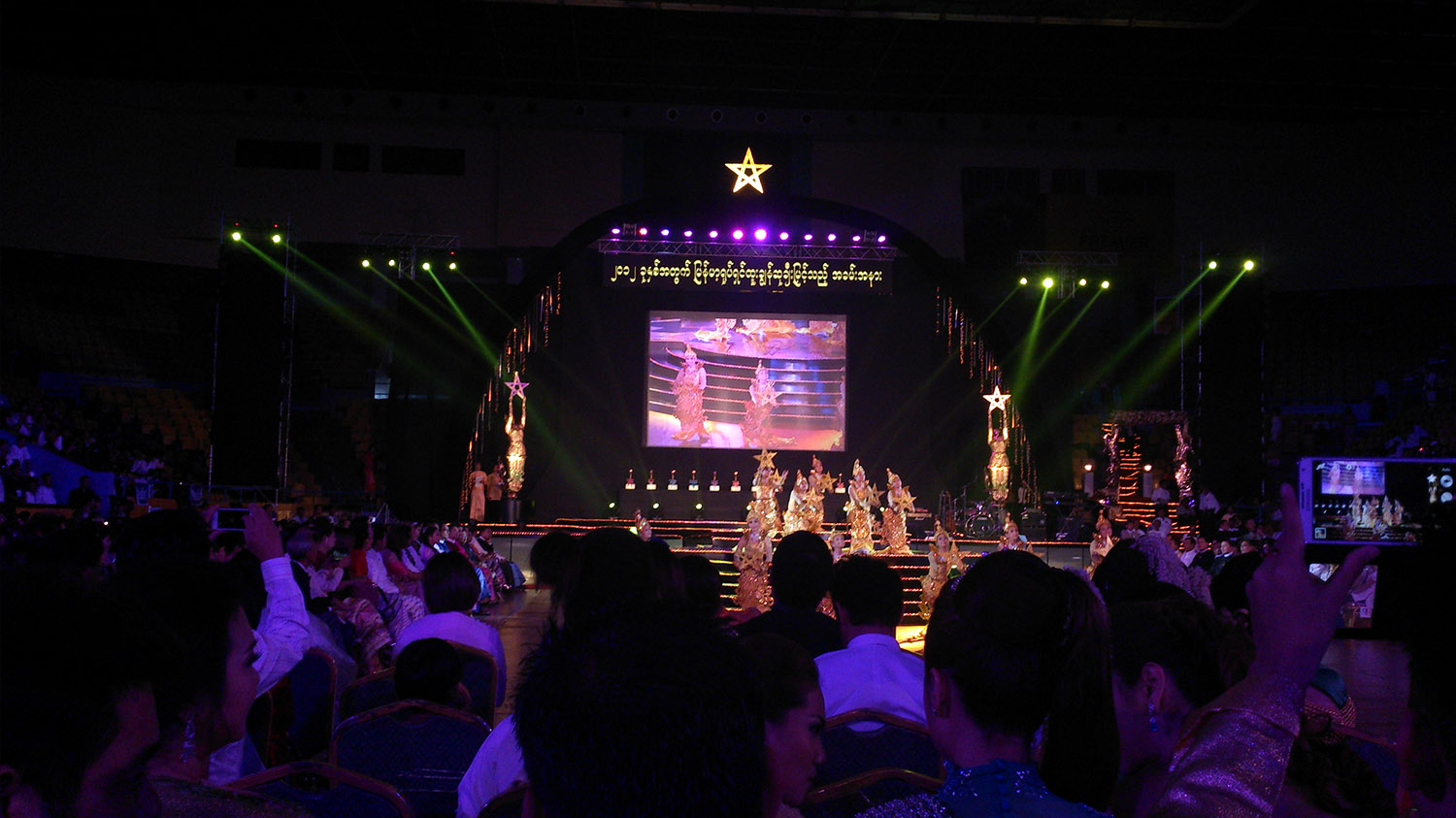 မြန်မာဘာသာ: ၂၀၁၂ မြန်မာအကယ်ဒမီ ရုပ်ရှင်ထူးချွန်ဆုပေးပွဲ